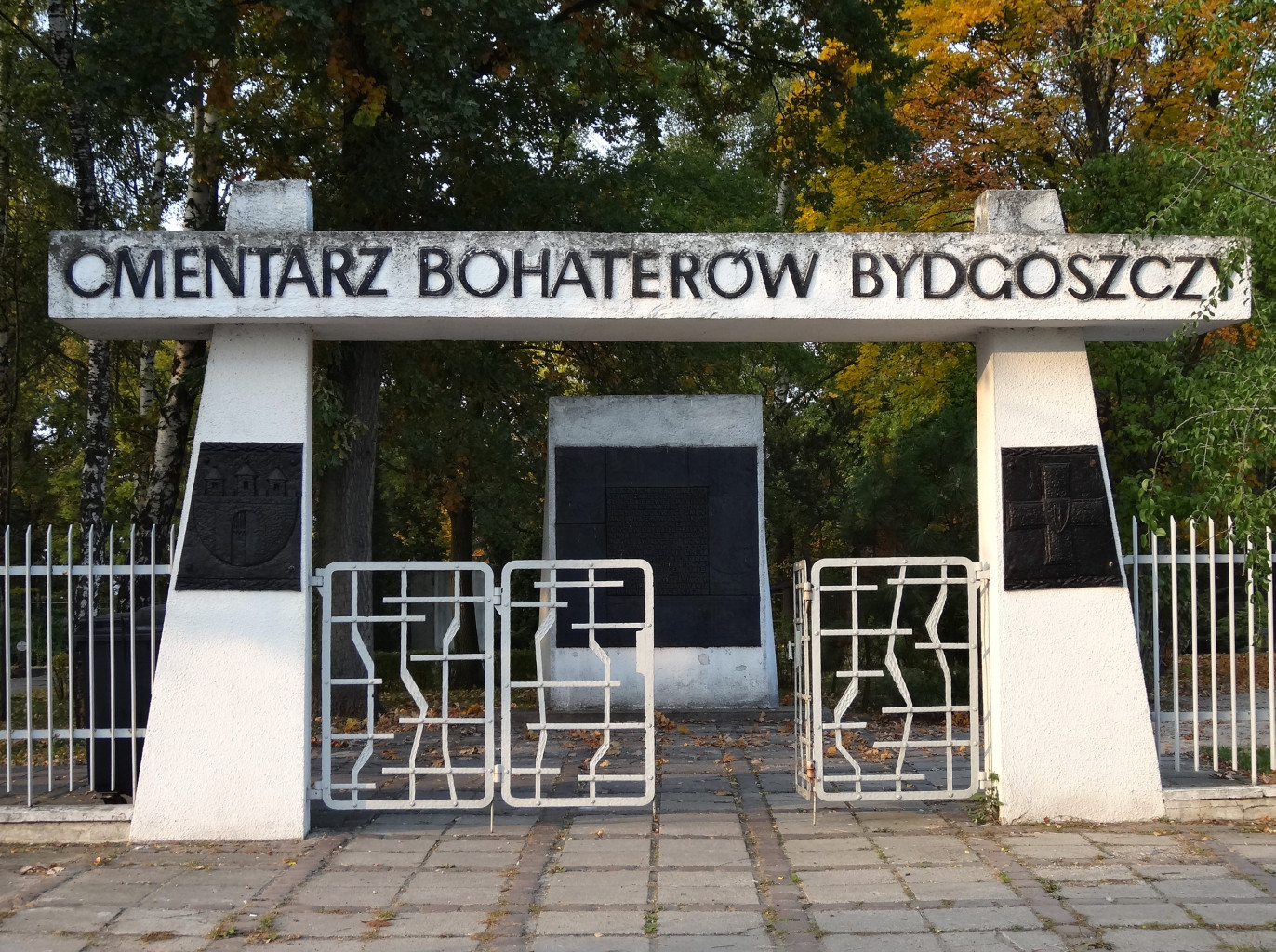 Cmentarz Bohaterów Bydgoszczy na osiedlu Wzgórze Wolności w Bydgoszczy